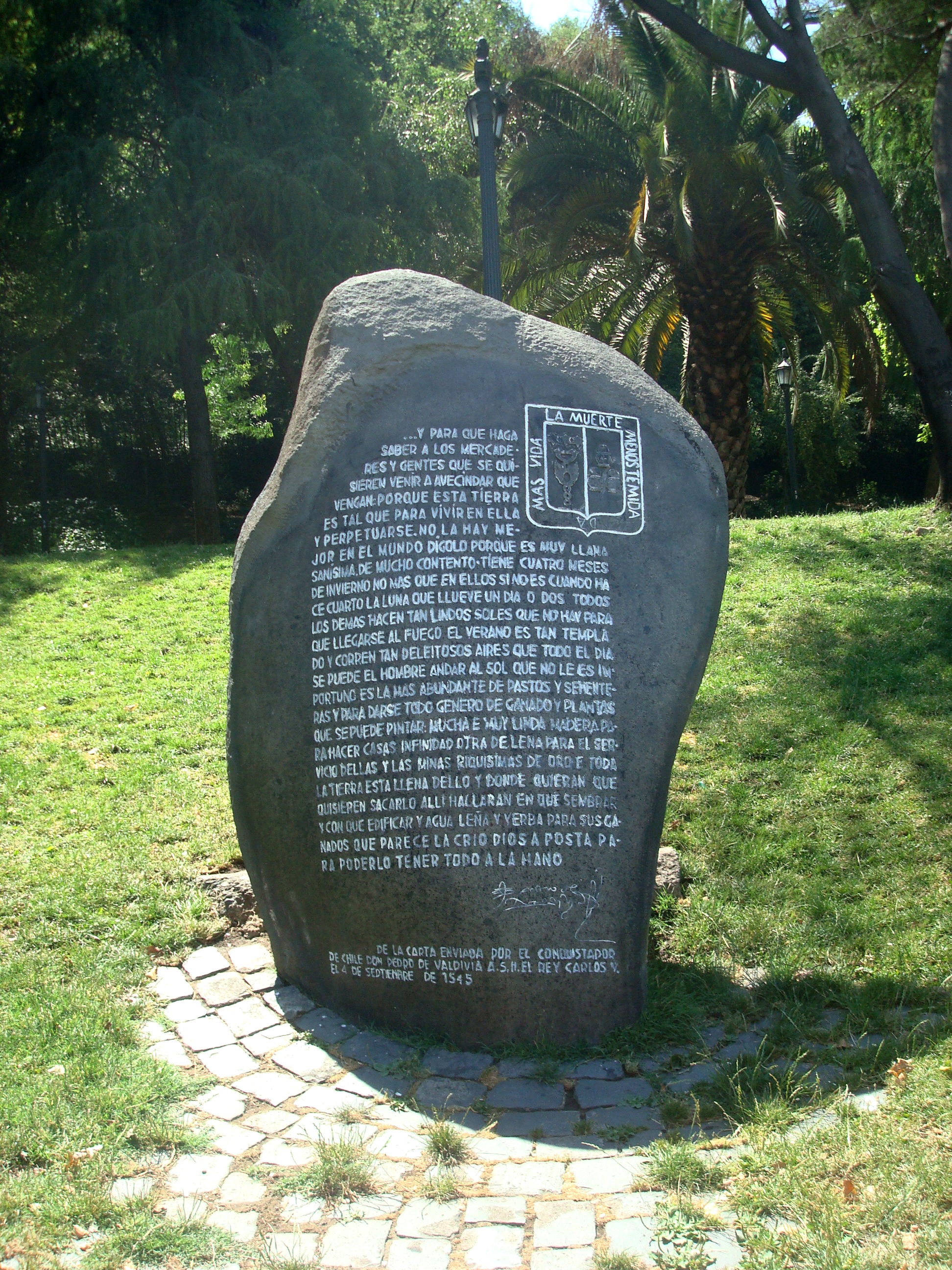 Monumento carta de Pedro de Valdivia a Carlos V